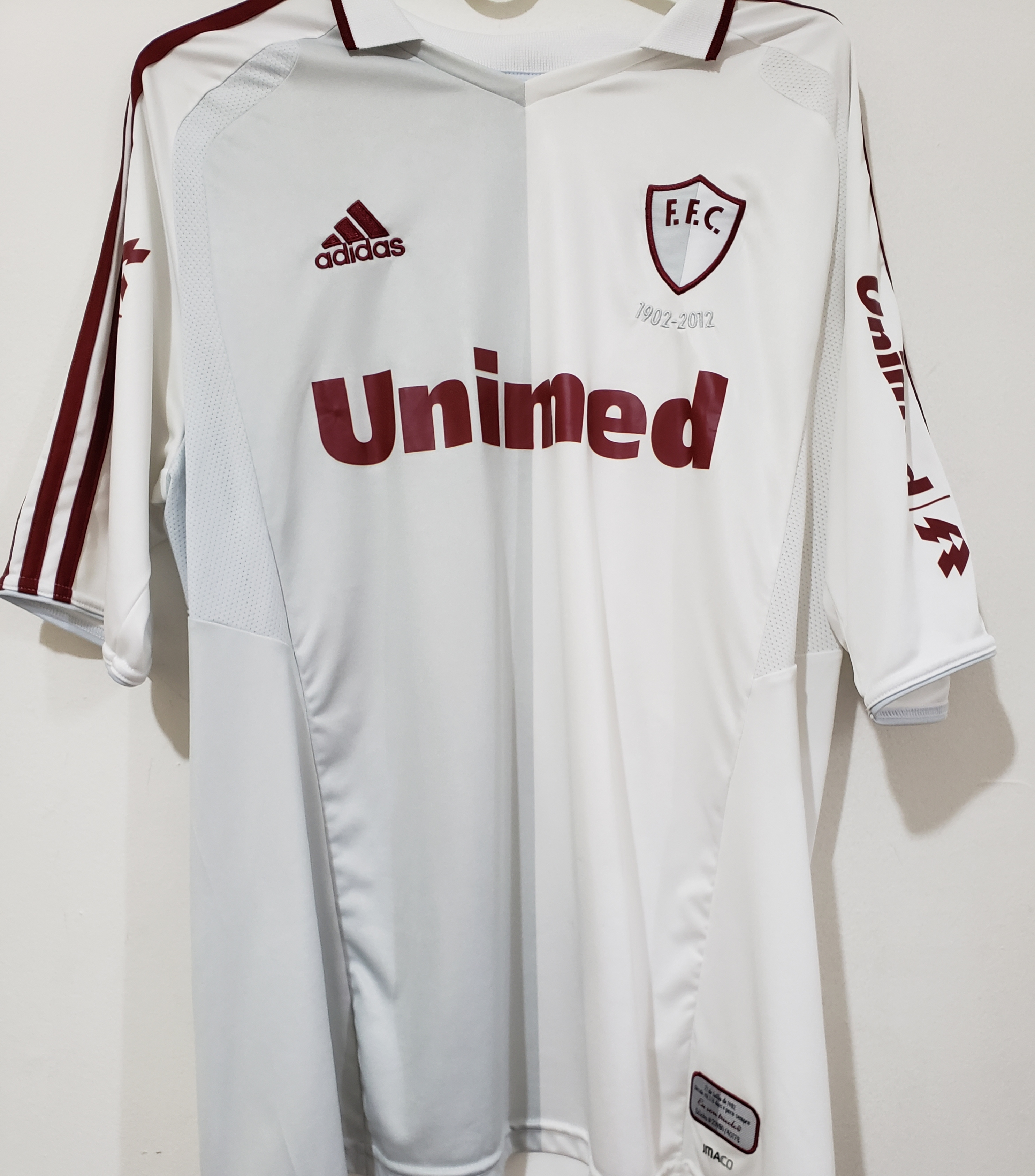 Camisa comemorativa do Centenário do Fluminense Football Club, utilizada apenas no primeiro tempo da partida amistosa contra o Toluca do México, a que festejou o centenário, nunca em jogos oficiais. O modelo seguiu a primeira camisa do Tricolor, de 1902 até 1904.